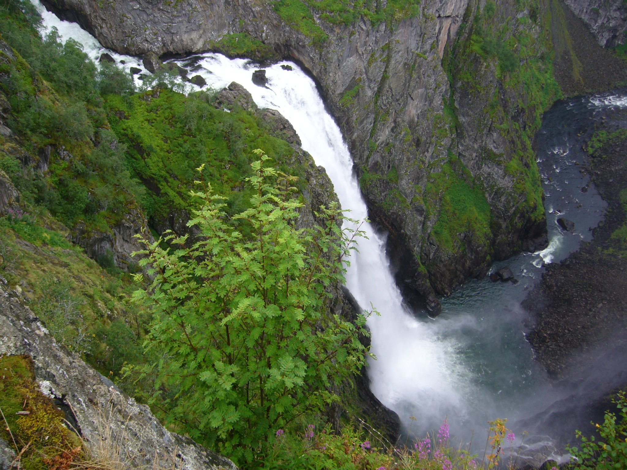 Der Vøringsfossen-Wasserfall aufgenommen von dem Aussichtspunkt Fossli Hotel. Insbesondere die letzten 145m Freifall im Focus